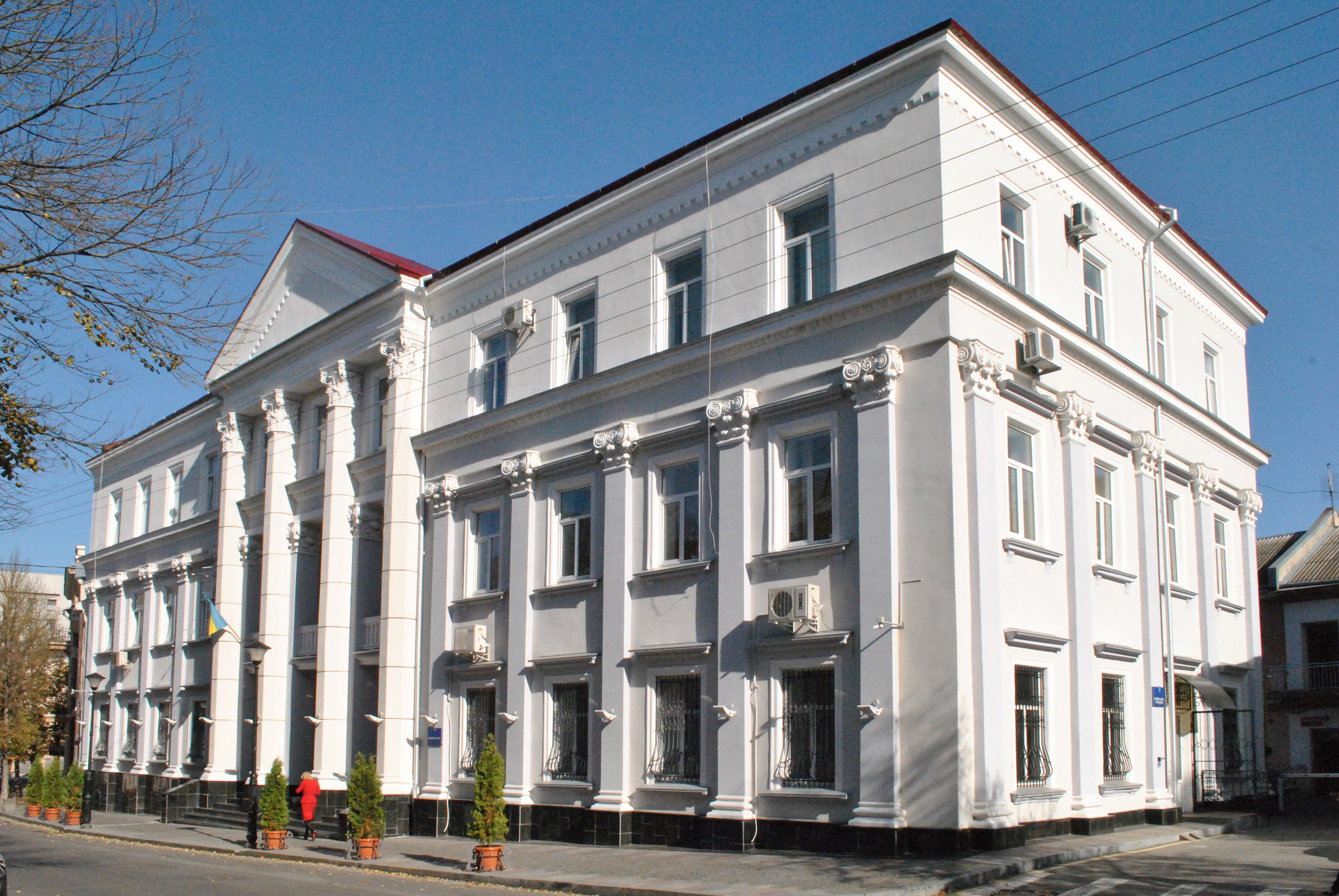 Колишній жіночий ліцей (мур.) у Тернополі на вул. Листопадова, 4. Нині тут знаходиться прокуратура Тернопільської області.